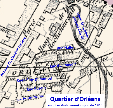 Quartier d'Orléans en 1846 (actuel 14ème arrondissemnt